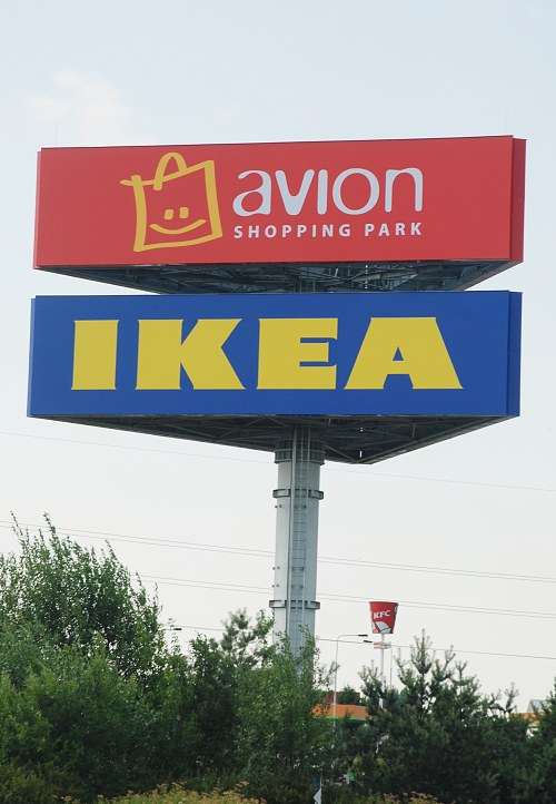 Avion shopping park - Praha Zličín